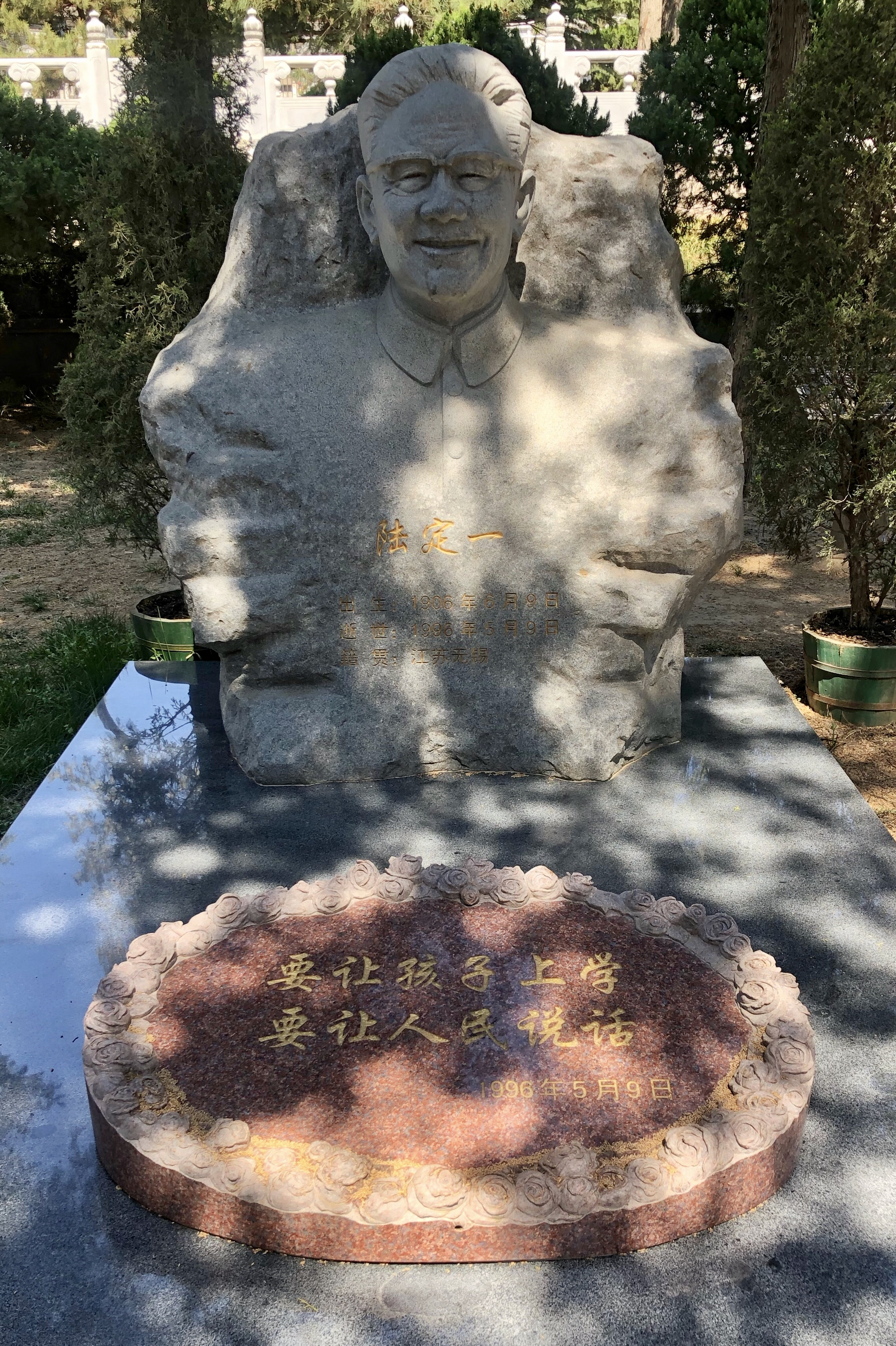 1980年代中华人民共和国文化部部长，中共宣传部部长（1959-1966）